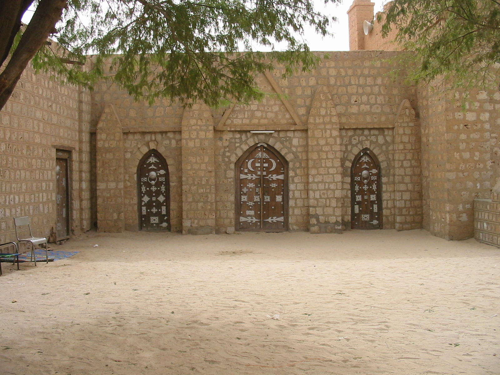 Portes de la Mosquée de Sidi Yehia, Toumbouctou